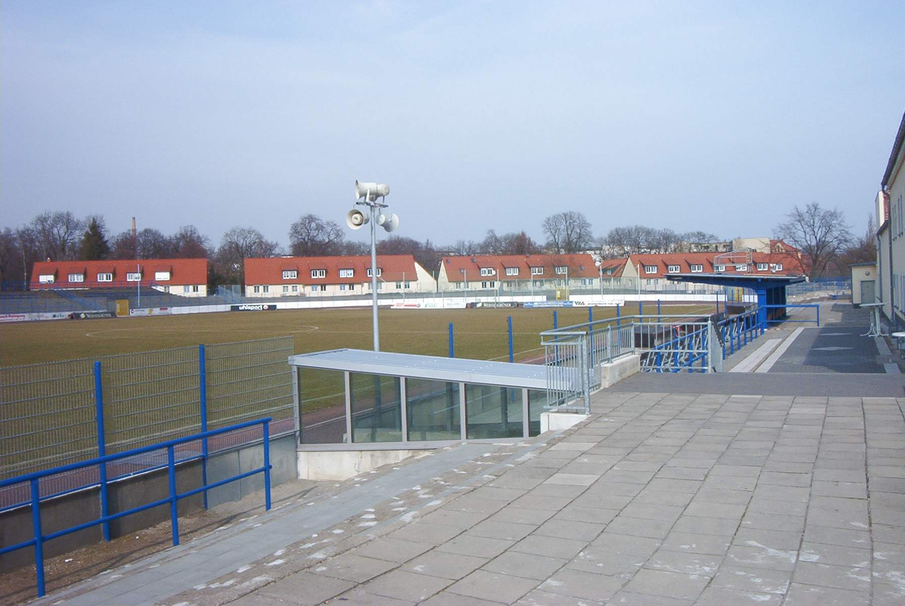 Heinrich-Germer-Stadion Magdeburg, Innenraum, am 16.3.2005 selbst aufgenommen, erteilte Lizenz: GNU-FDL